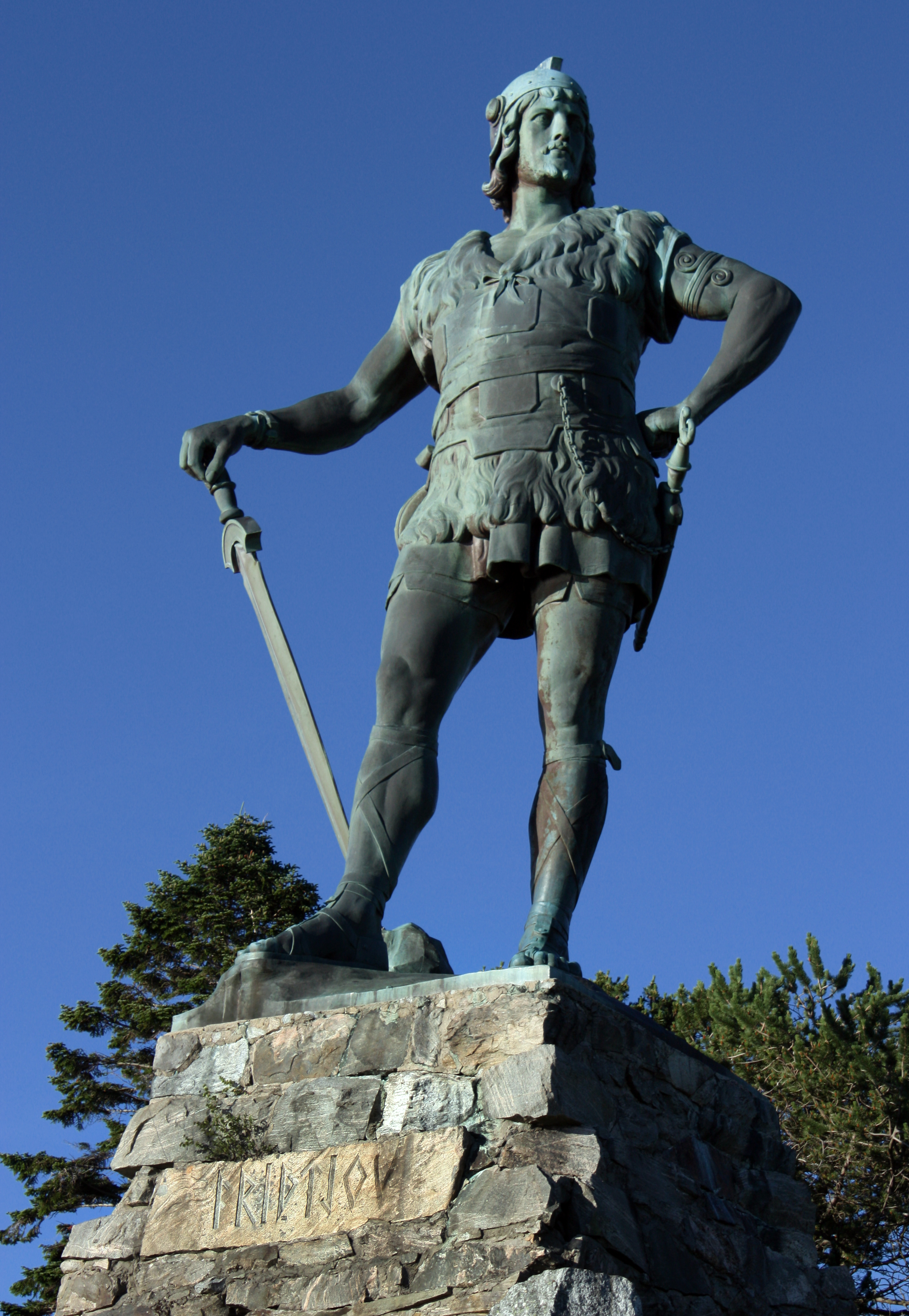 Statue av Fridtjov den frøkne oppført av keiser Vilhelm II av Det tyske rike. Sokkelens bakside bærer den følgende tyskspråklige inskripsjon: DIESES DENKMAL WURDE CESCHAFFEN VOM BILDHAUER MAX UNGER ZU STEGLITZ- -BERLIN, IN DER ZEIT VON 1910–1912. DEN BRONCEGUSS FÜHRTE DIE AKTIEN-GESELLSCHAFT GLADENBECK IN BERLIN-FRIEDRICHSHAGEN IN 8 MONATEN AUS. DEN SOCKEL BAUTE INGENIEUR HERTZBERG IN BERGEN. DIE FIGUR HAT EINE HÖHE VON 12 METERN. DER SOCKEL IST 10½ METERN HOCH.